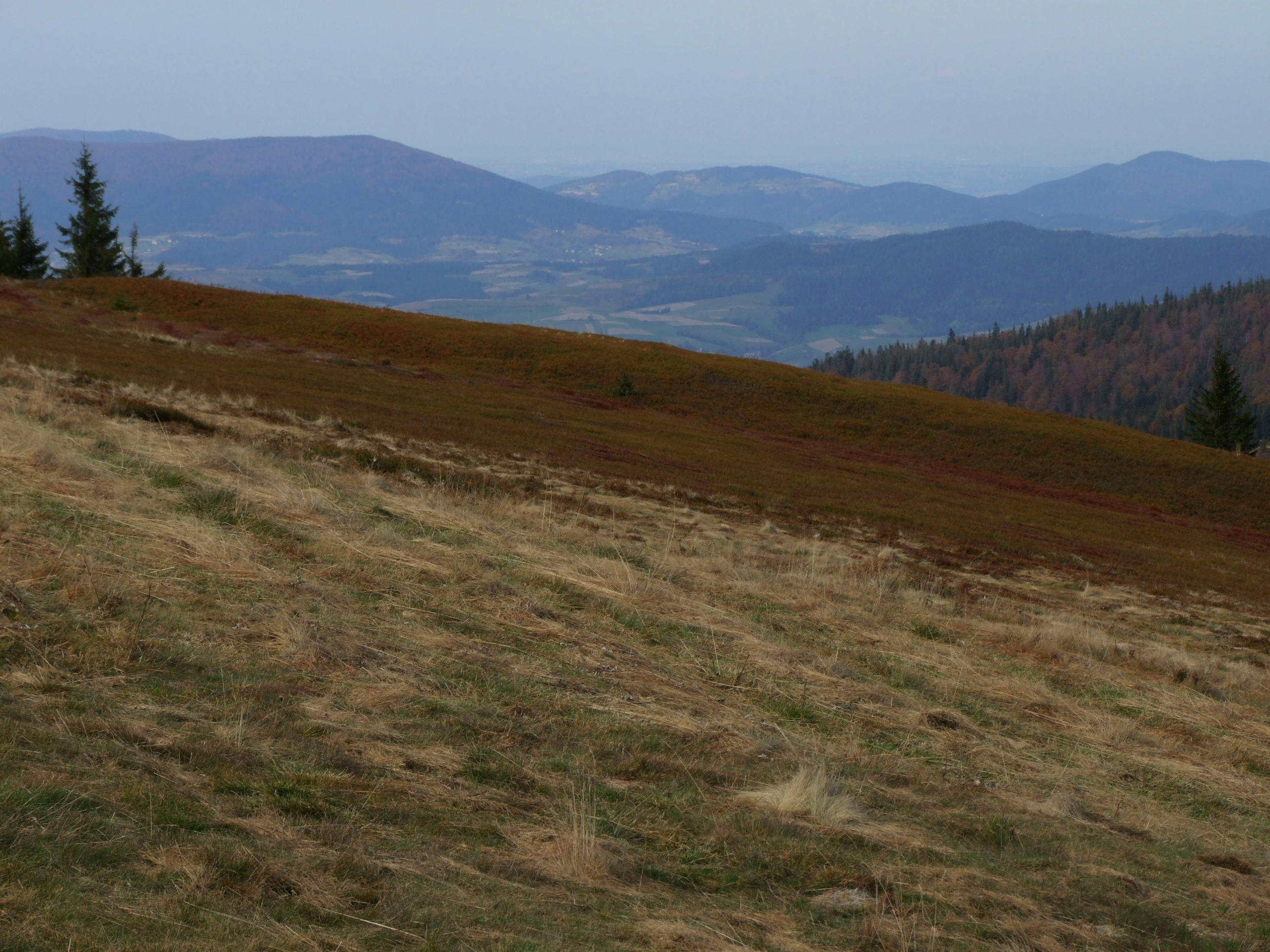 Polana Jaworzyna Kamienicka (Gorce). Widok na Beskid Wyspowy